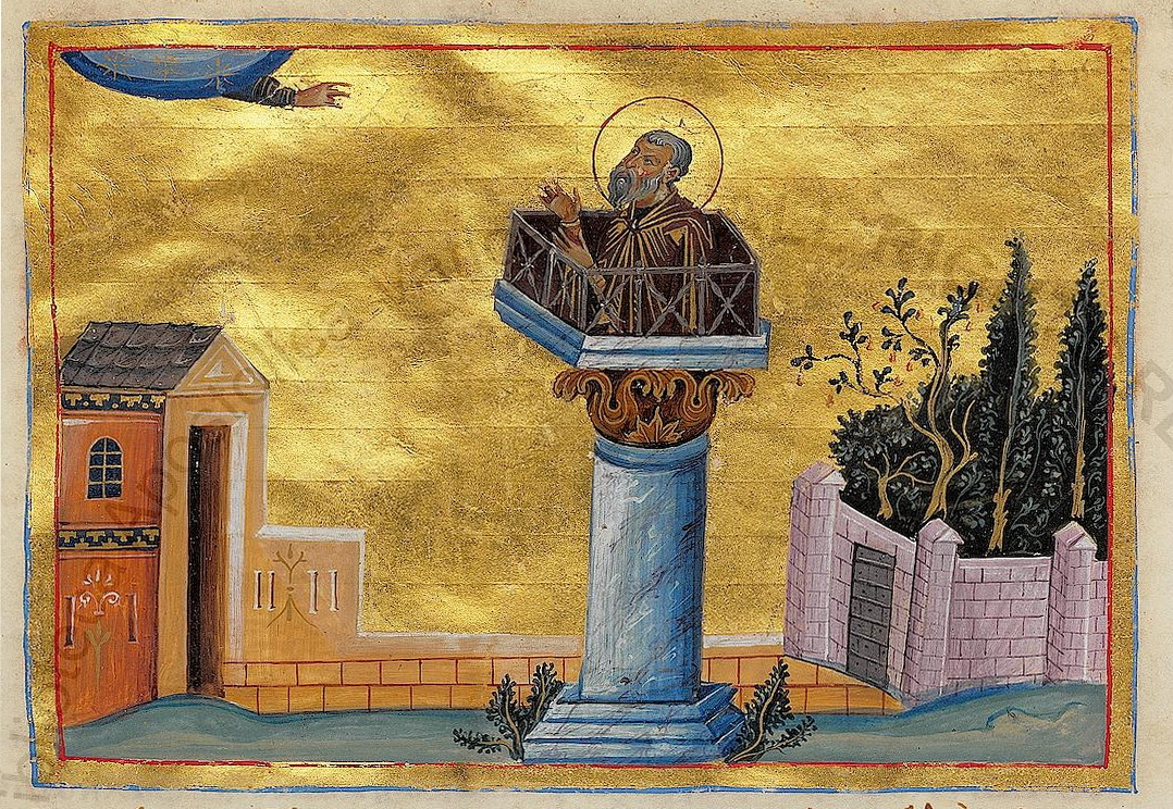 Константинополь. 985 г. Миниатюра Минология Василия II. Ватиканская библиотека. Рим.